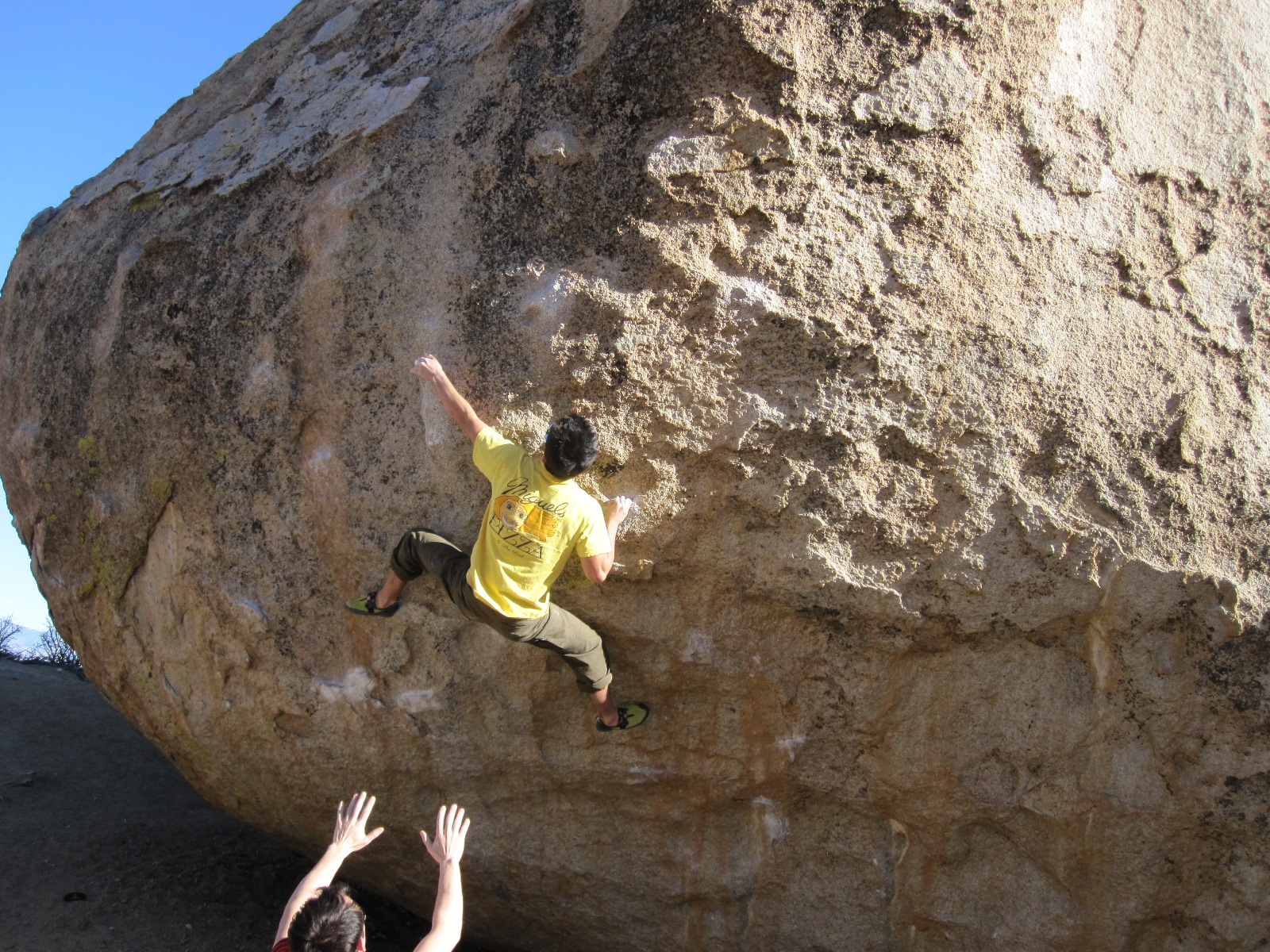 high plains drifter v7